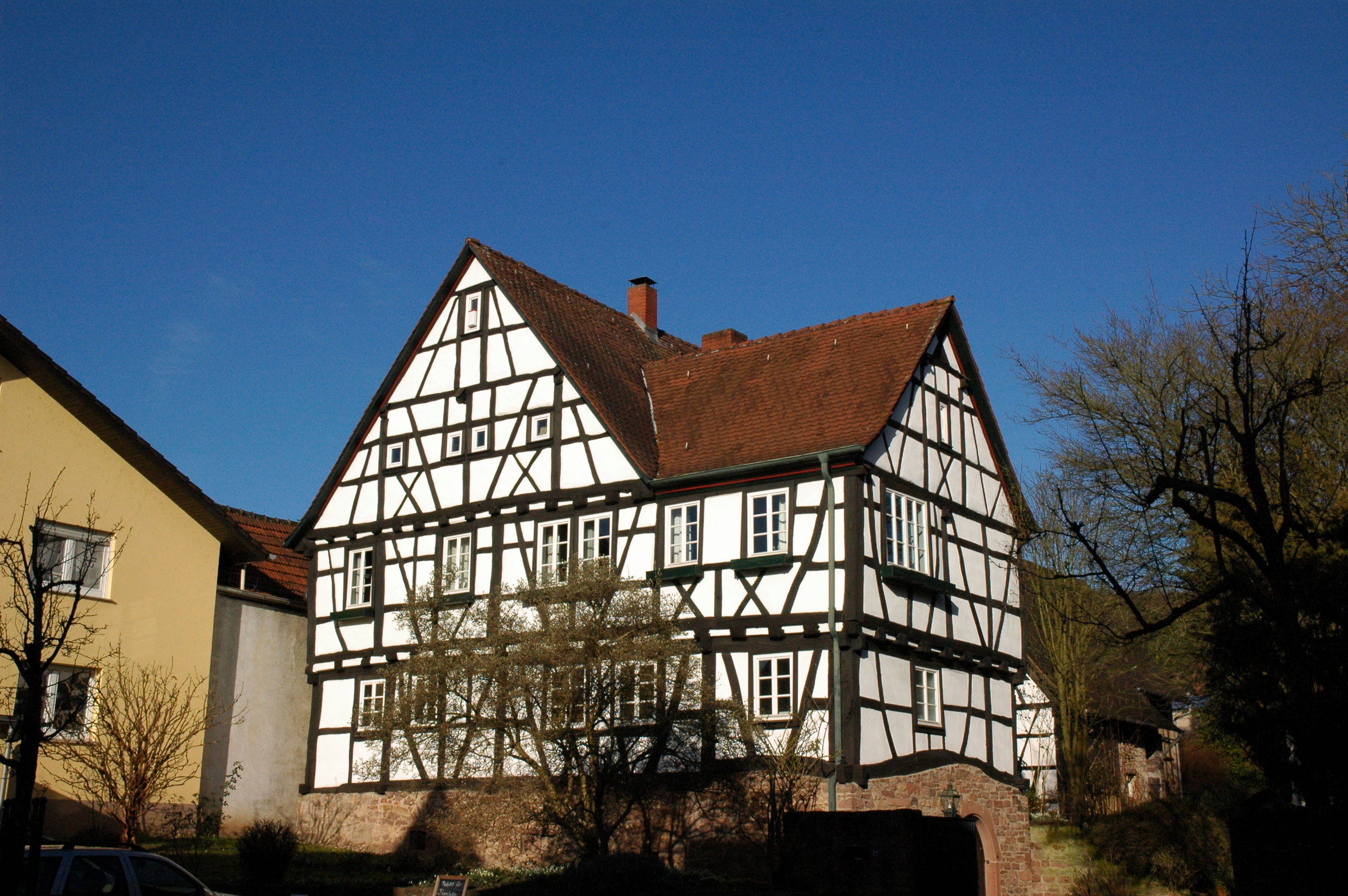 Hauptstrasse 12 in Bammental.